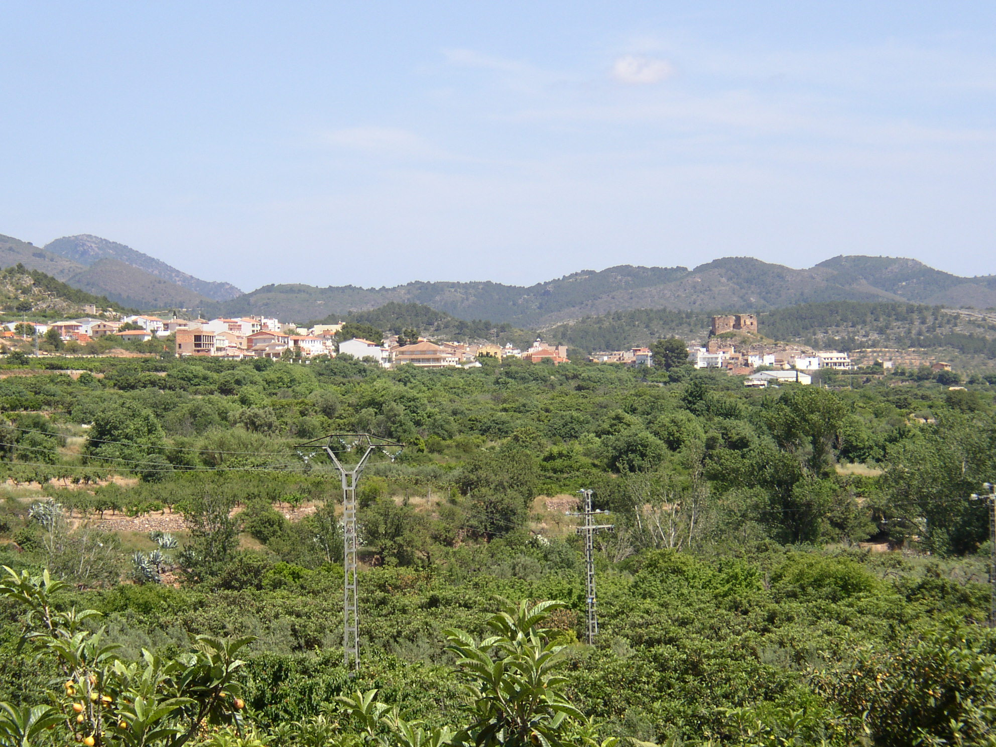 Castellón (Comunidad Valenciana) España. Castellnovo. (provincia de Castellón). Vista general. Fotografía realizada el 19 mayo de 2006 por el autor Usuario : Pelayo2